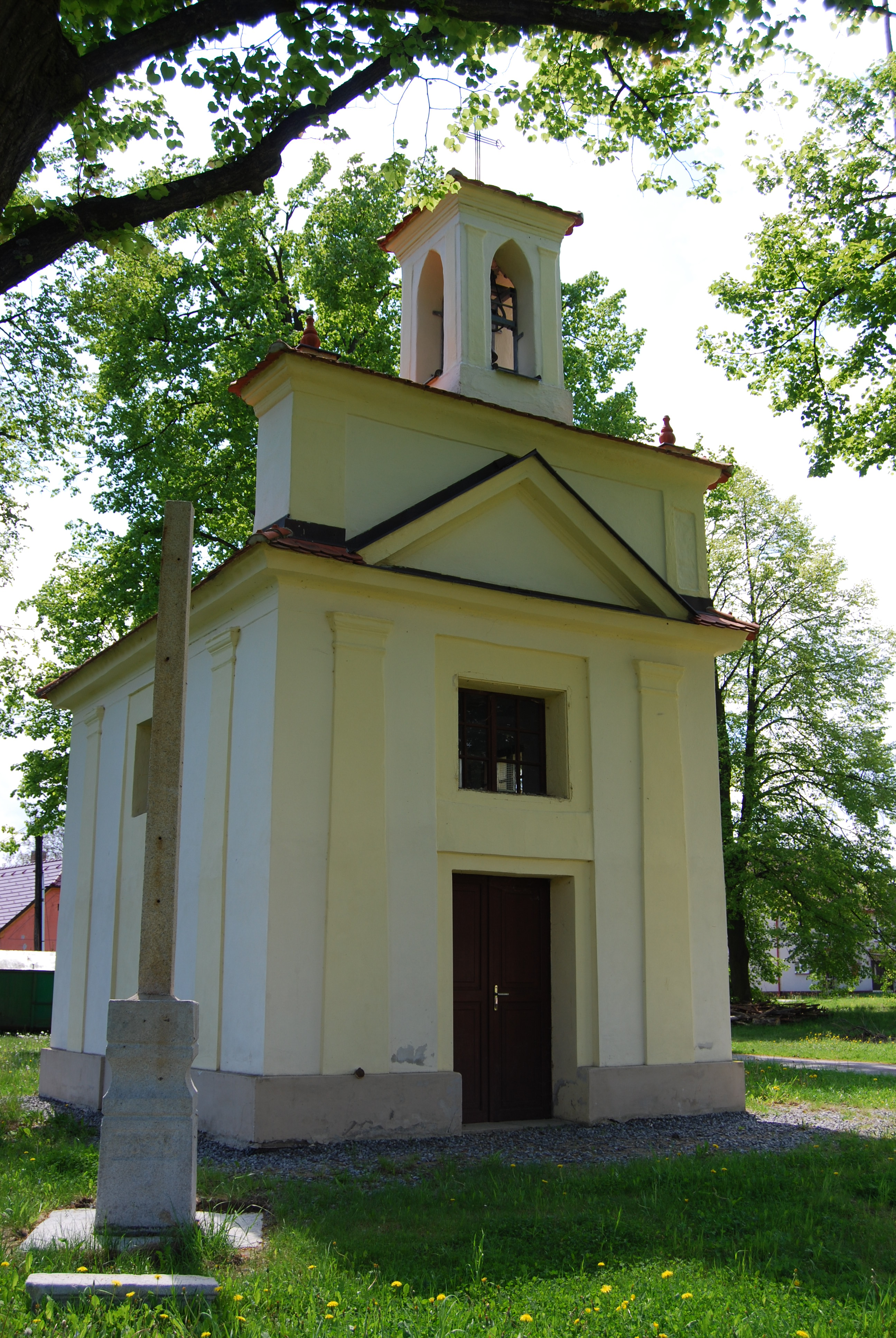 Návesní kaple Svatých Andělů Strážných. Obec Lipovice se nachází v okrese Prachatice, kraj Jihočeský. Česká republika.